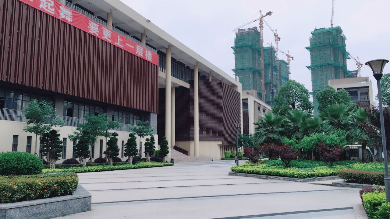 图中从左到右是福州第八中学三江口校区的科技楼与教学楼。